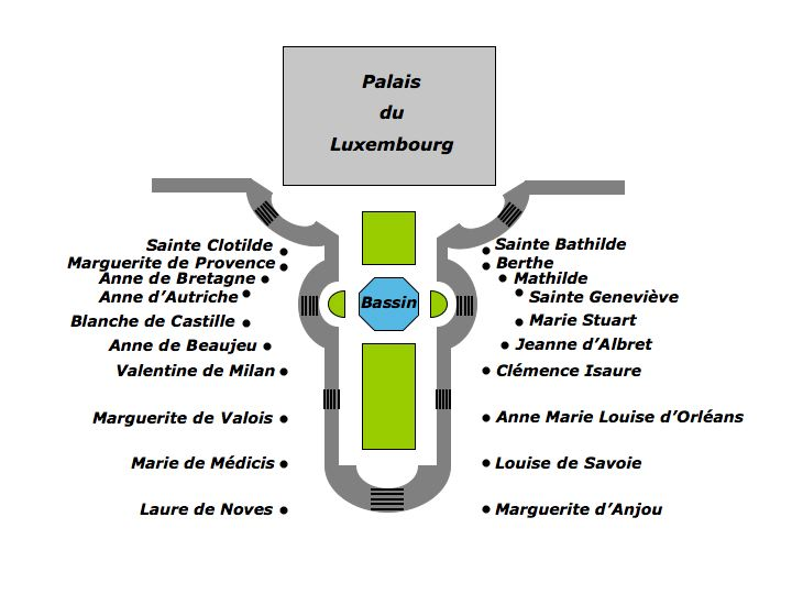 Disposition des Reines de France et Femmes illustres dans le jardin du Luxembourg à Paris